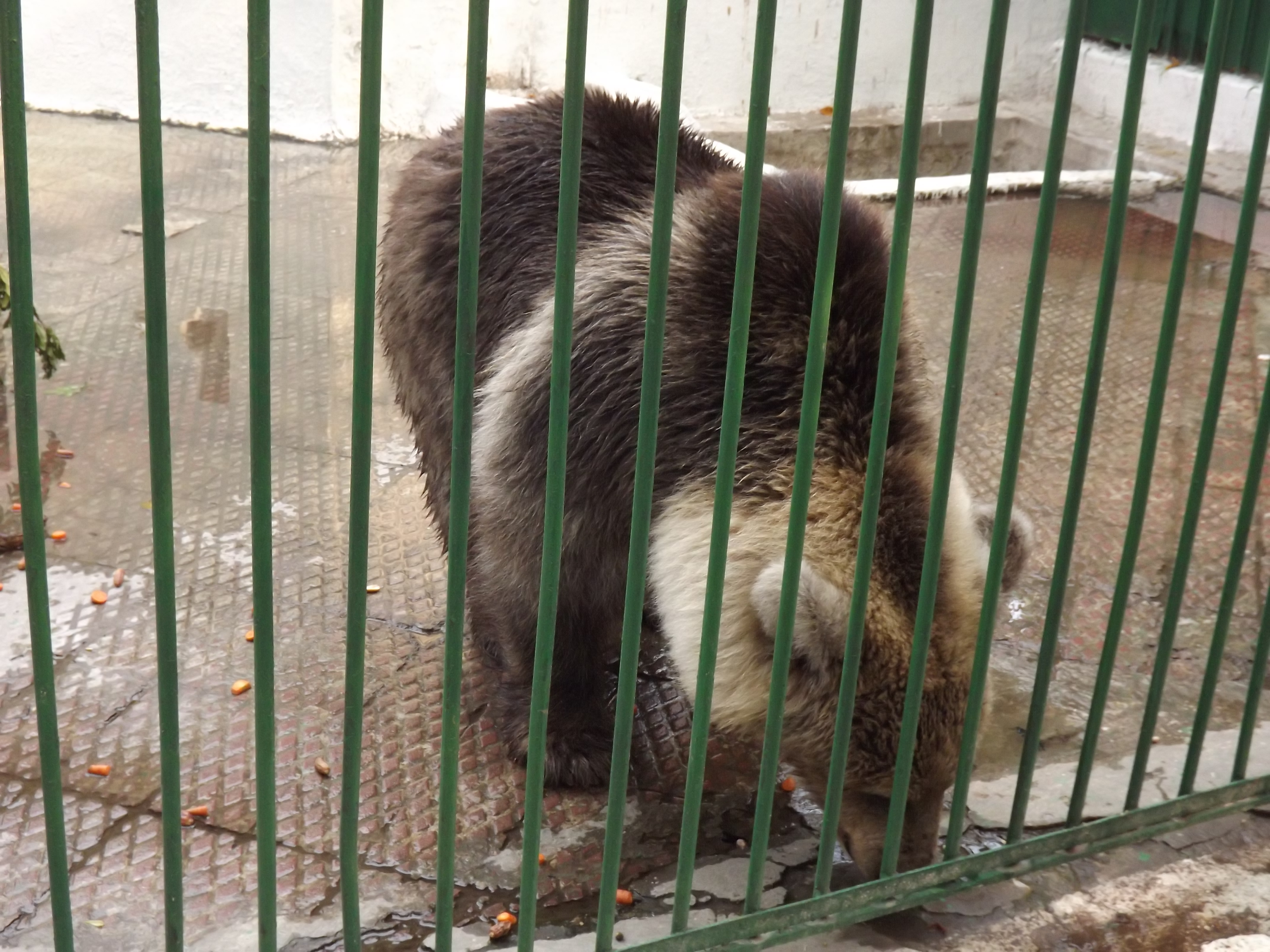 دب بني في حديقة حيوان النزهة - الاسكندرية